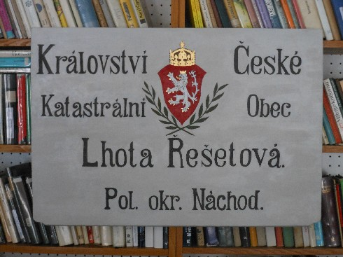 Historický nápis vesnice v místní knihovně.